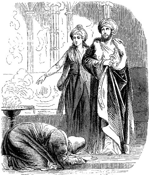 Illustration par Pauquet de la tragédie Bajazet de Racine, dans le Panthéon populaire illustré, 2e série, 1851